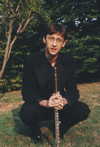 Flautista Sergio Zampetti